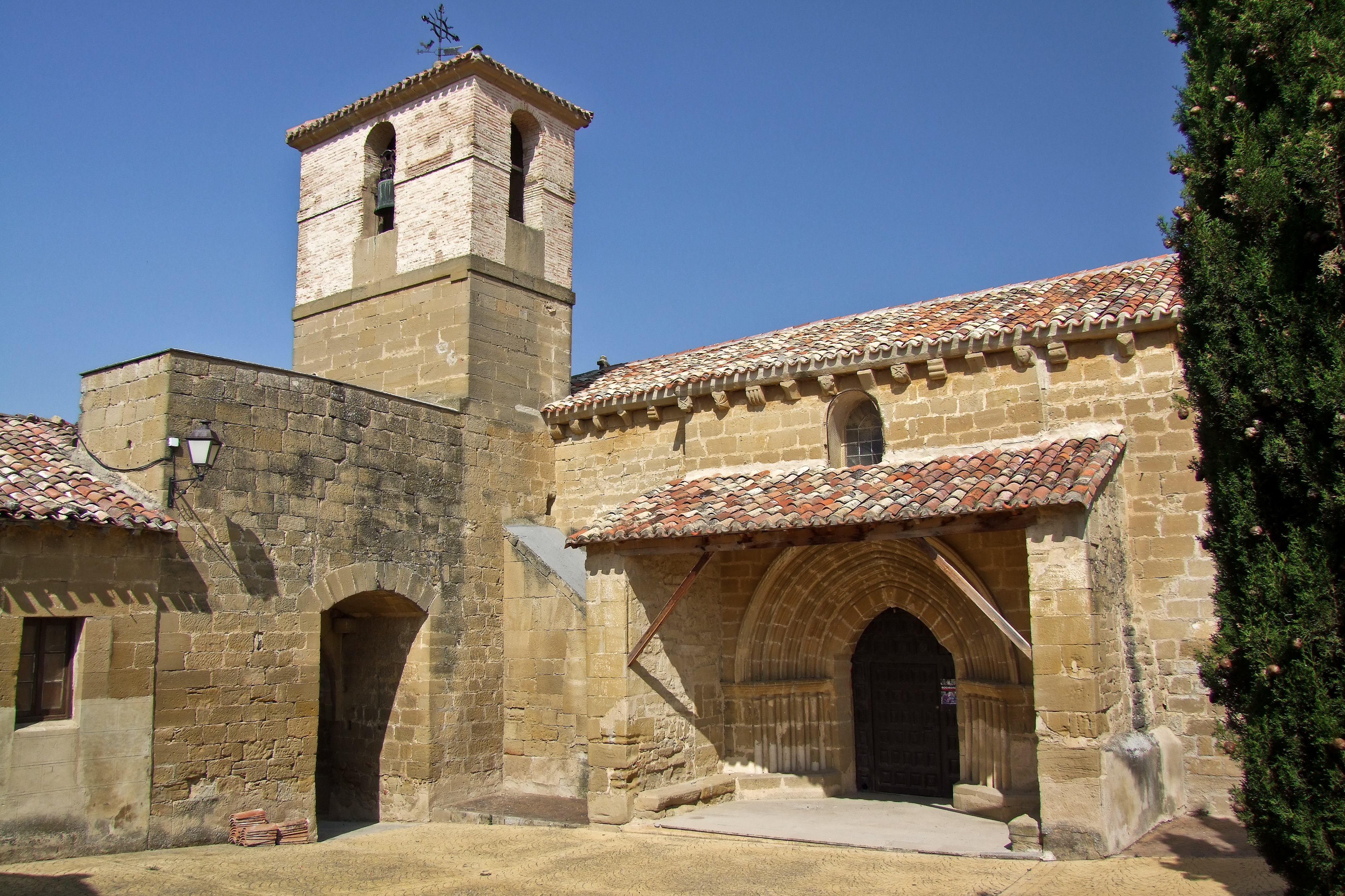 Iglesia de San Román en la localidad de Villaseca, La Rioja - España